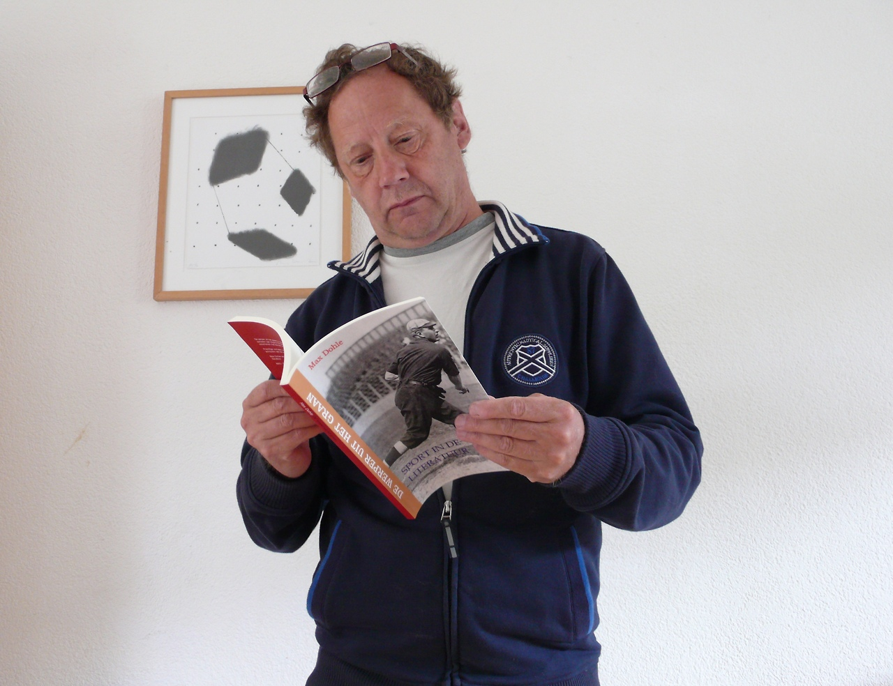 Max Dohle met zijn boek De Werper Uit Het Graan